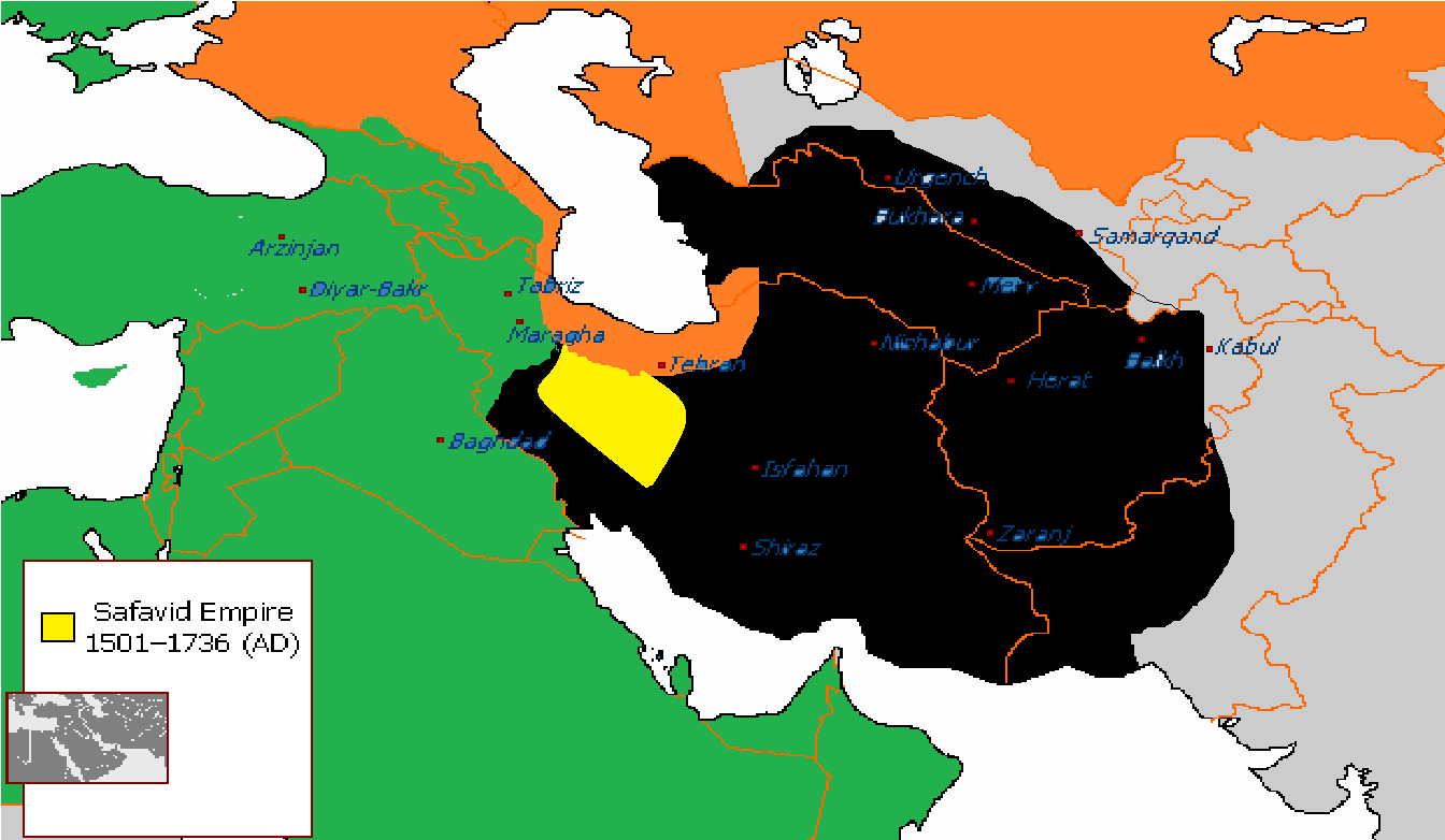 Yaşıl-Osmanlı imperiyası Sarı-Səfəvi dövləti Narıncı-Rusiya imperiyası Qara-Əfqan dövləti